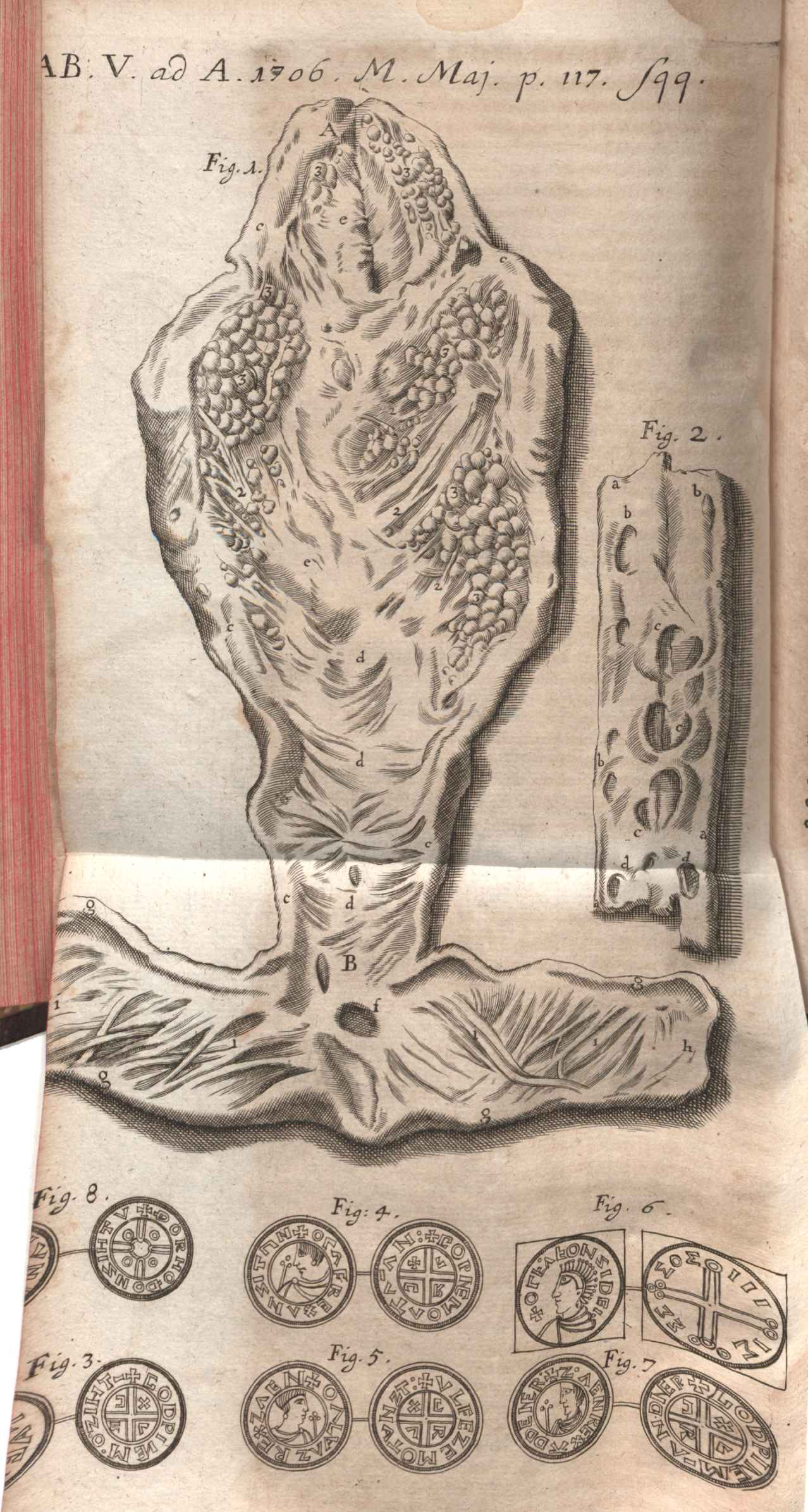 Illustration